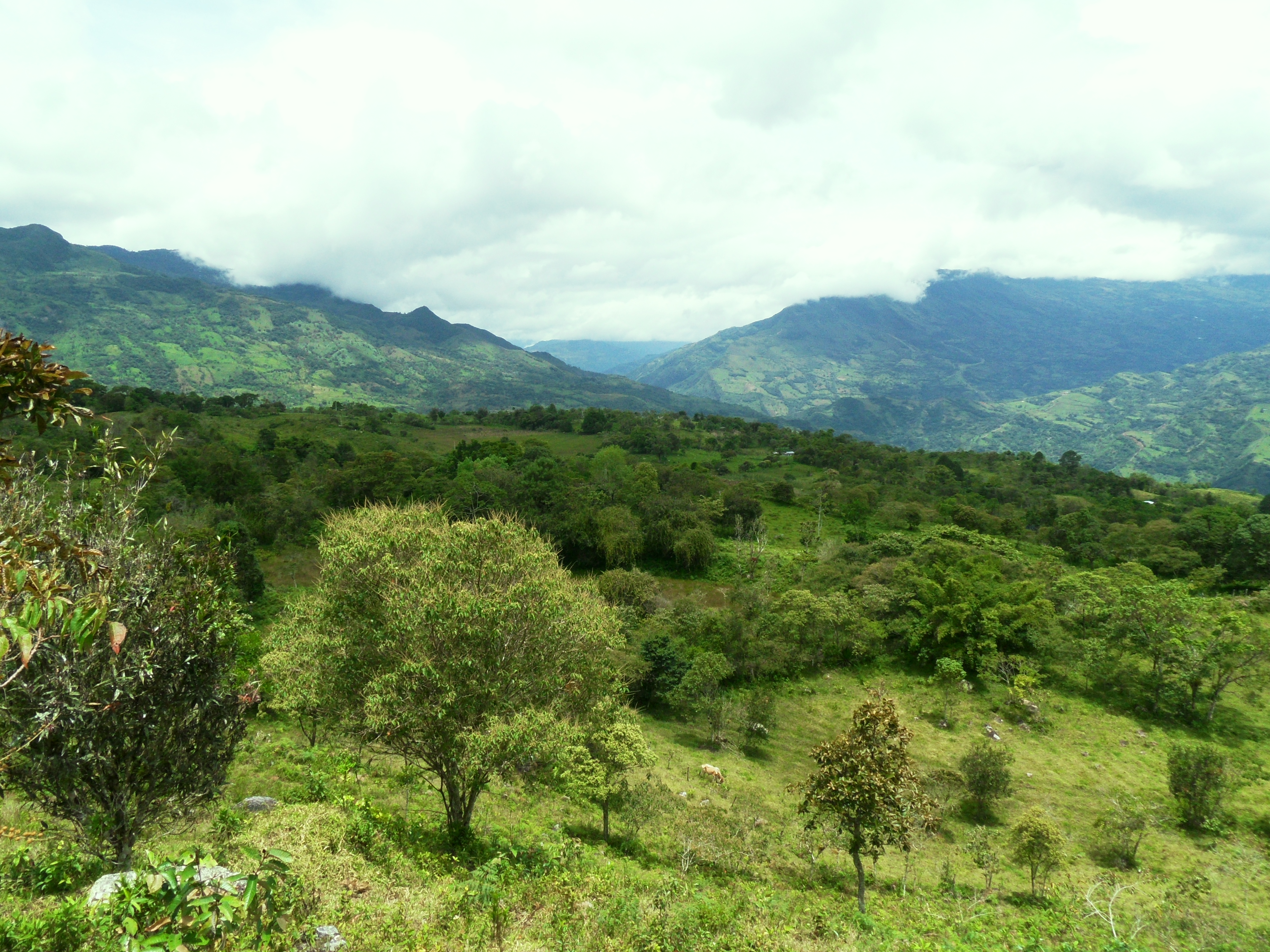 panoramica hacia paez y campo hermoso